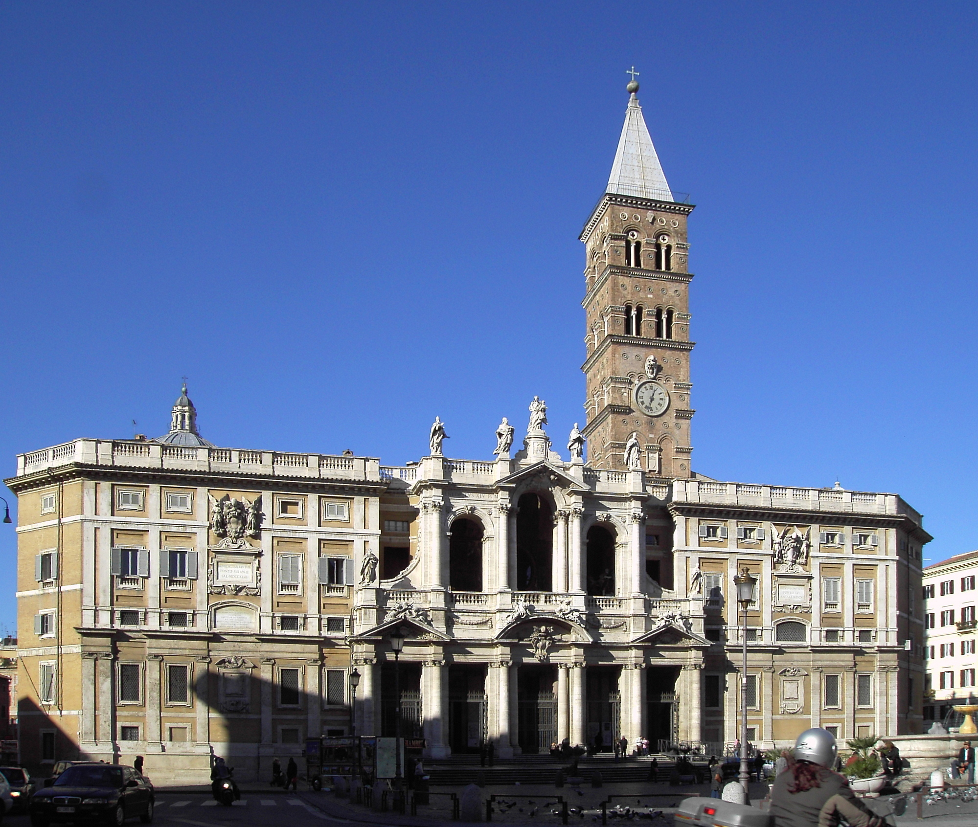 Basilica di Santa Maria Maggiore - front